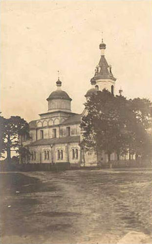 Беларуская (тарашкевіца): Крывошын (Kryvošyn), пляц Рынак (plac Rynak). Касьцёл па маскоўскай перабудове